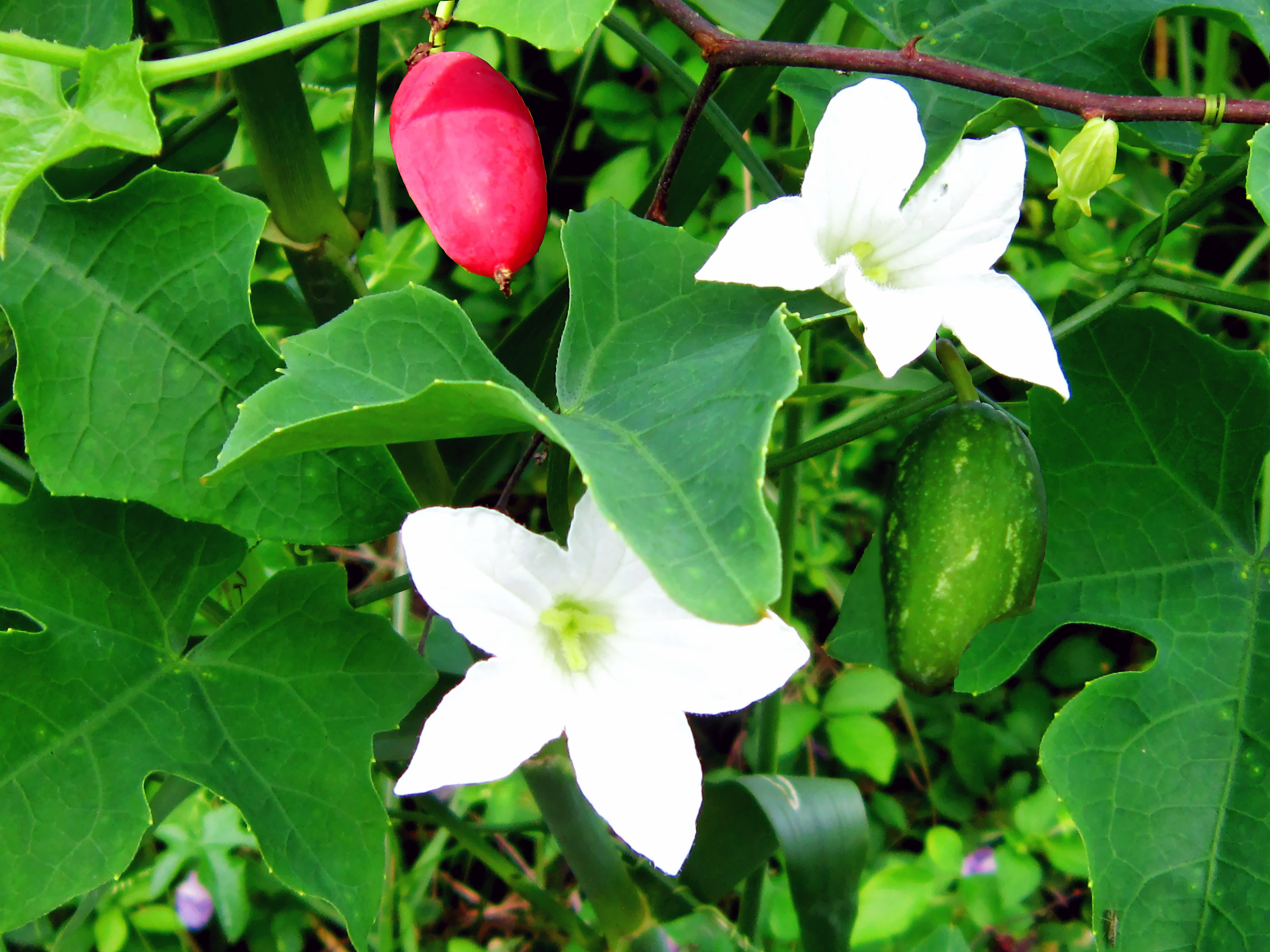 Mảnh bát hay còn gọi là miểng bát. Tên khoa học: Coccinia cordifolia (L.) Cogn, họ Bí (Cucurbitaceae). Lá và quả non dùng làm rau ăn. Ngoài ra, Mảnh bát còn được dùng làm thuốc. Ảnh: Lá, hoa, trái xanh và trái chín.